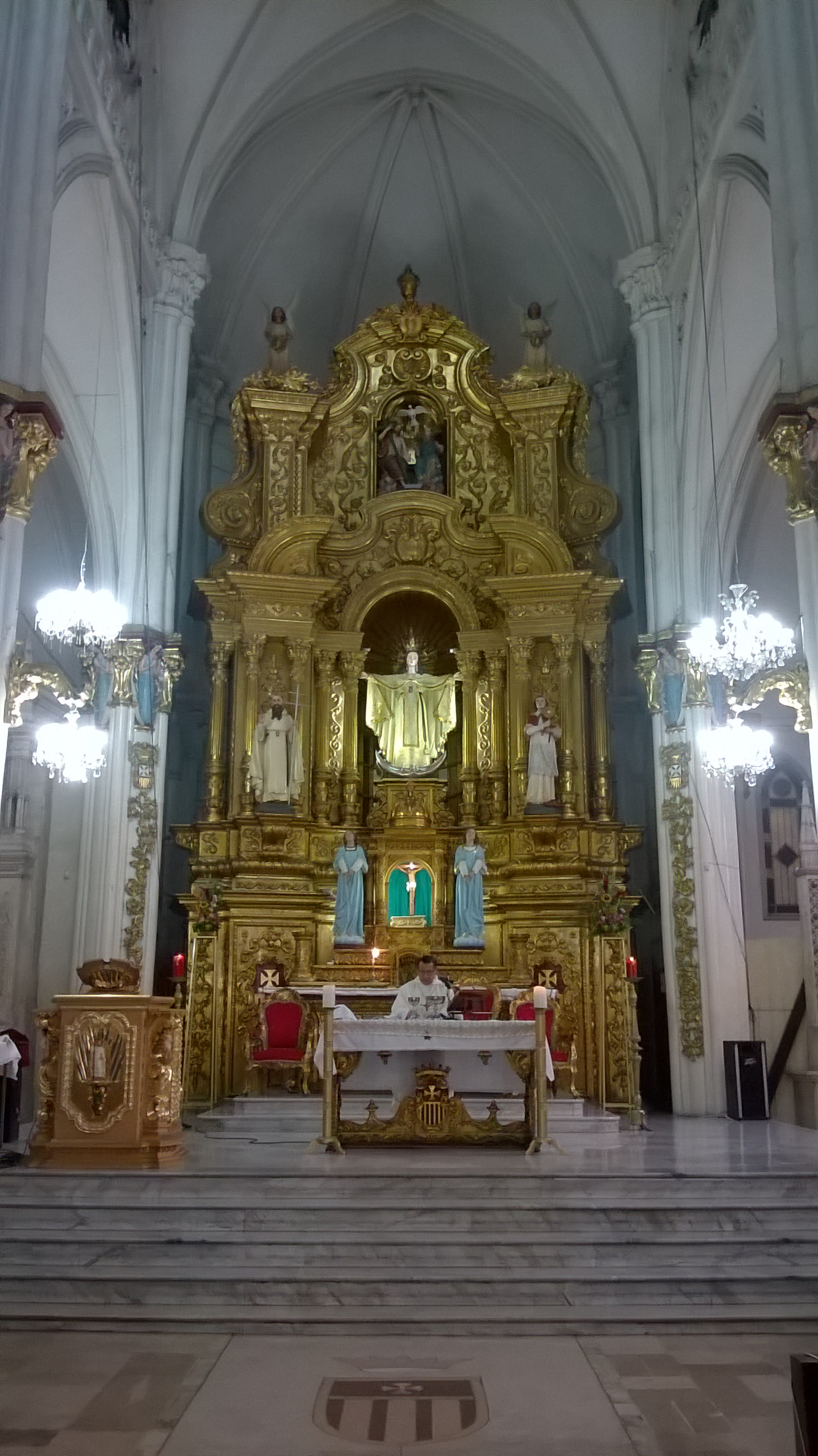 Altar de la Basílica Menor de la Merced en Guayaquil.